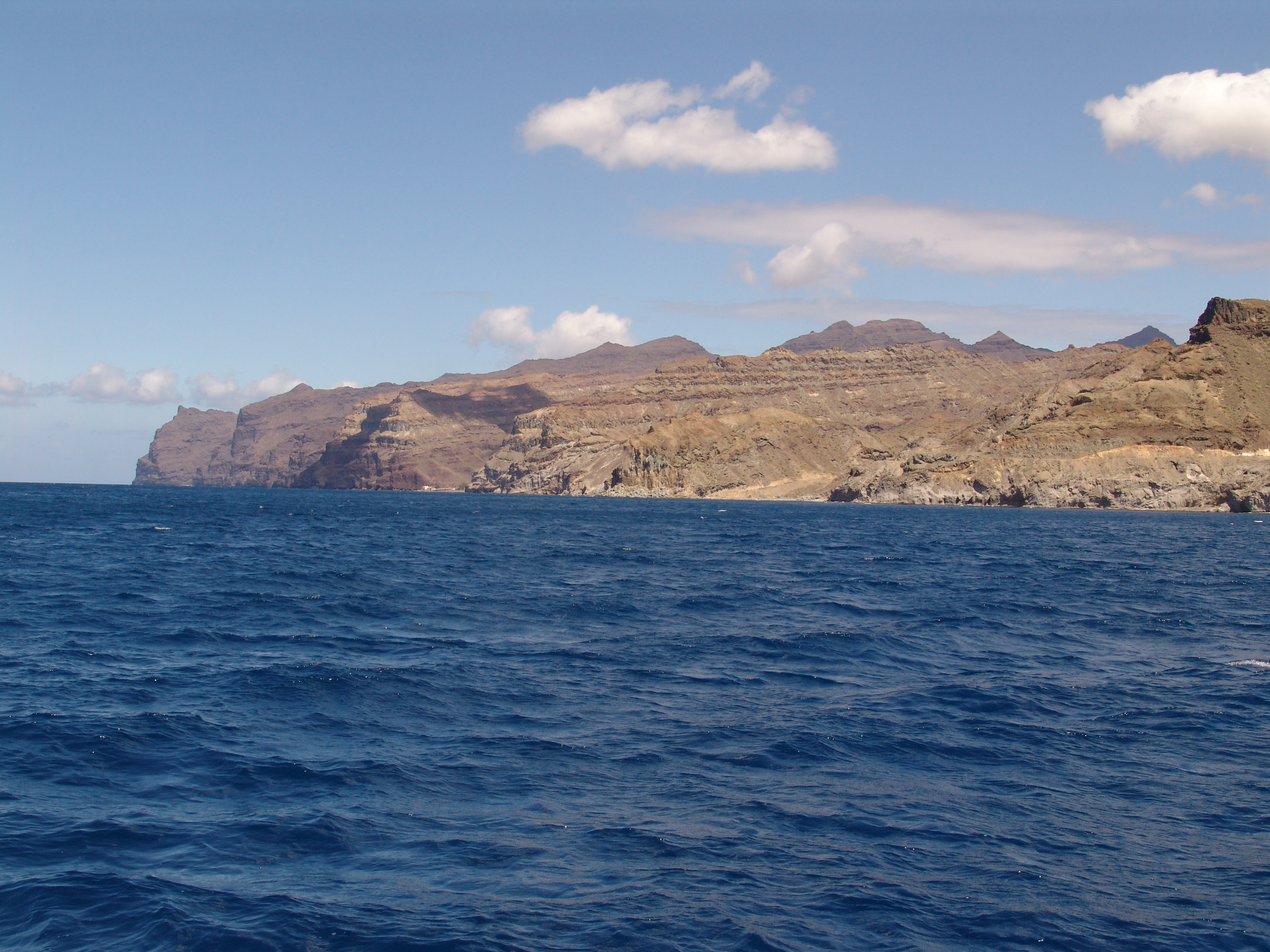 Westküste Gran Canarias